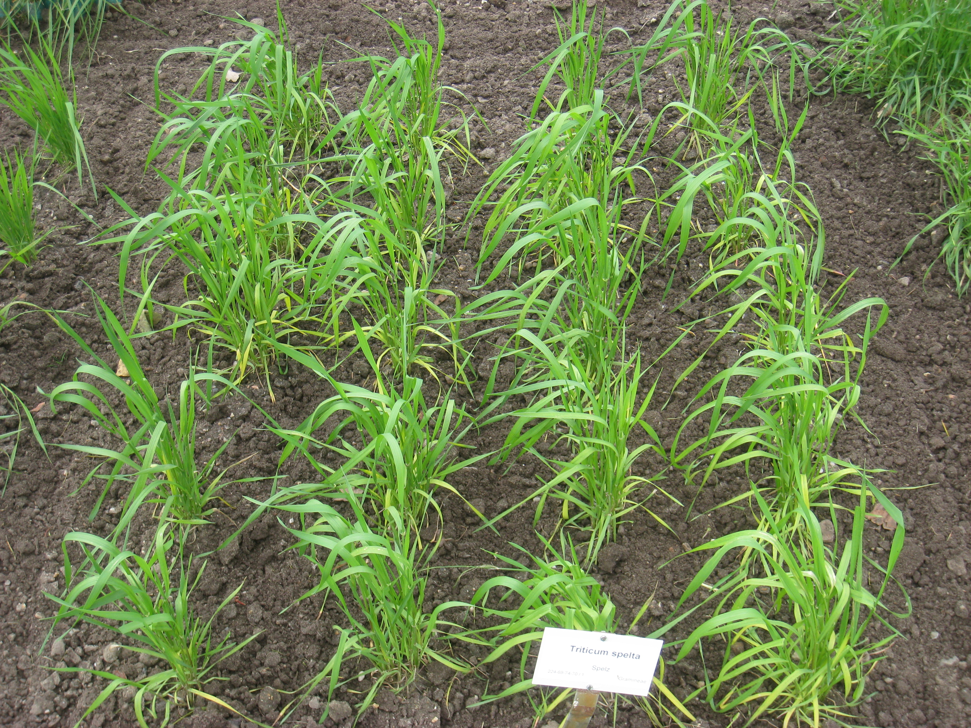 Triticum spelta specimen in the Botanischer Garten, Berlin-Dahlem (Berlin Botanical Garden), Berlin, Germany.